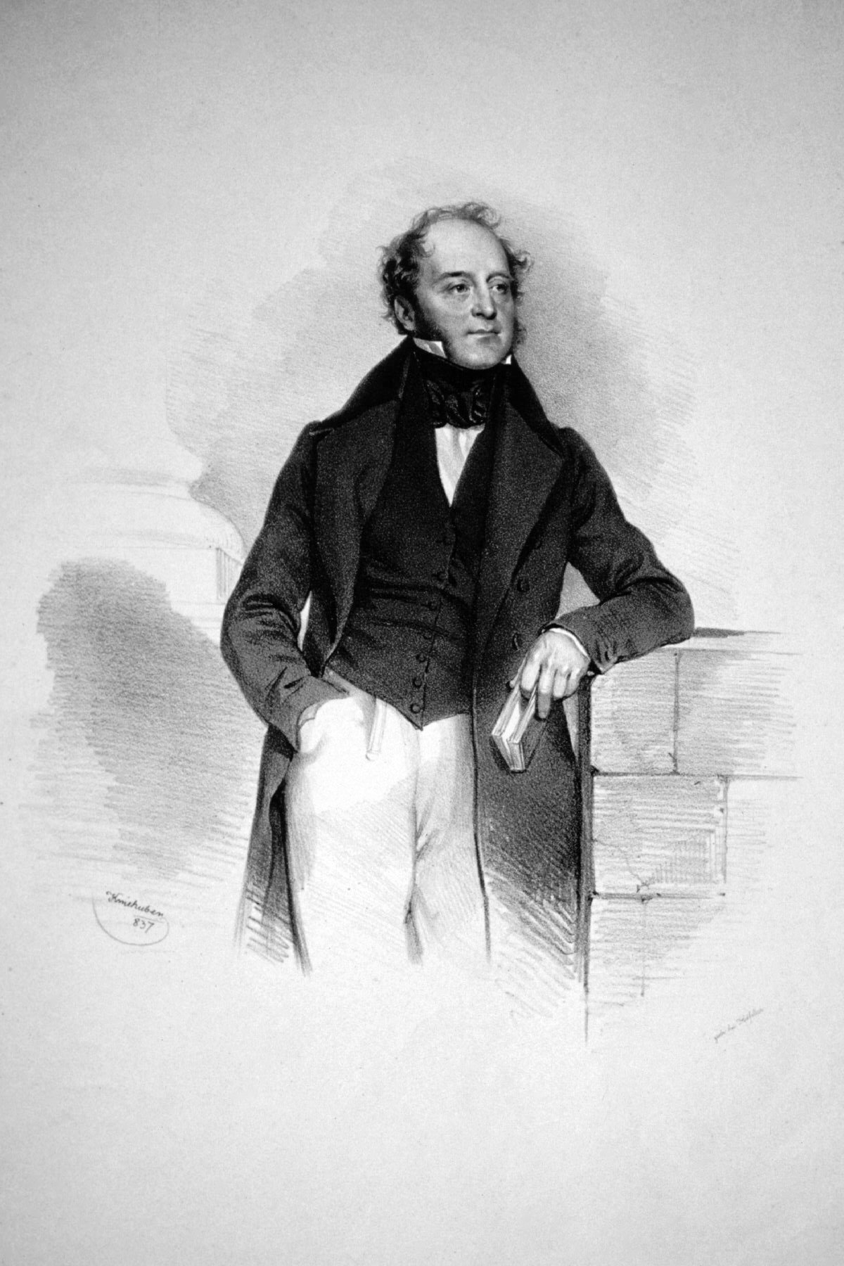 Johann Nepomuk Metzburg Senior (1780-1839), k. k. Beamter, Statistiker. Lithographie von Josef Kriehuber, 1837